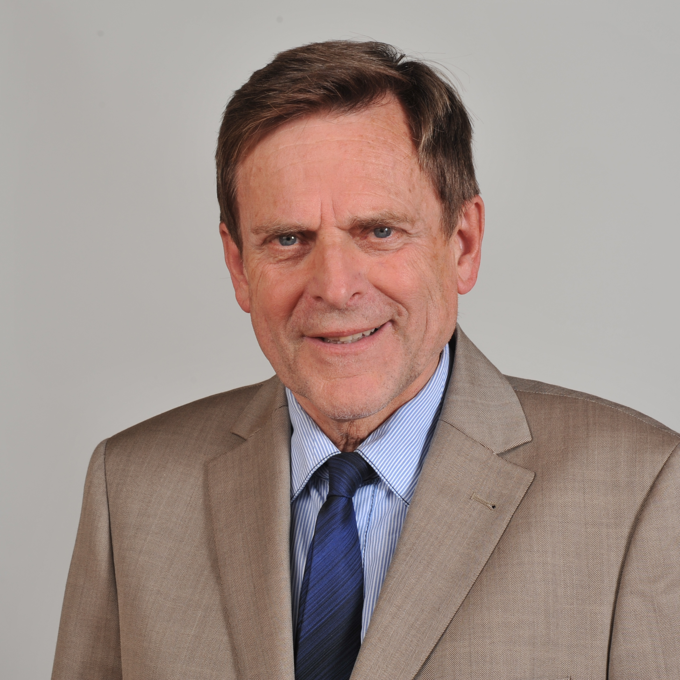 Landtagsprojekt Bayern The making of this work was supported by Wikimedia Austria. For other files made with the support of Wikimedia Austria, please see the category Supported by Wikimedia Österreich. Wikipedia im Landtag – Bayern 17. bis 19. Juli 2012 in MünchenDieses Foto wurde im Rahmen des Projektes „Wikipedia im Landtag“ erstellt.